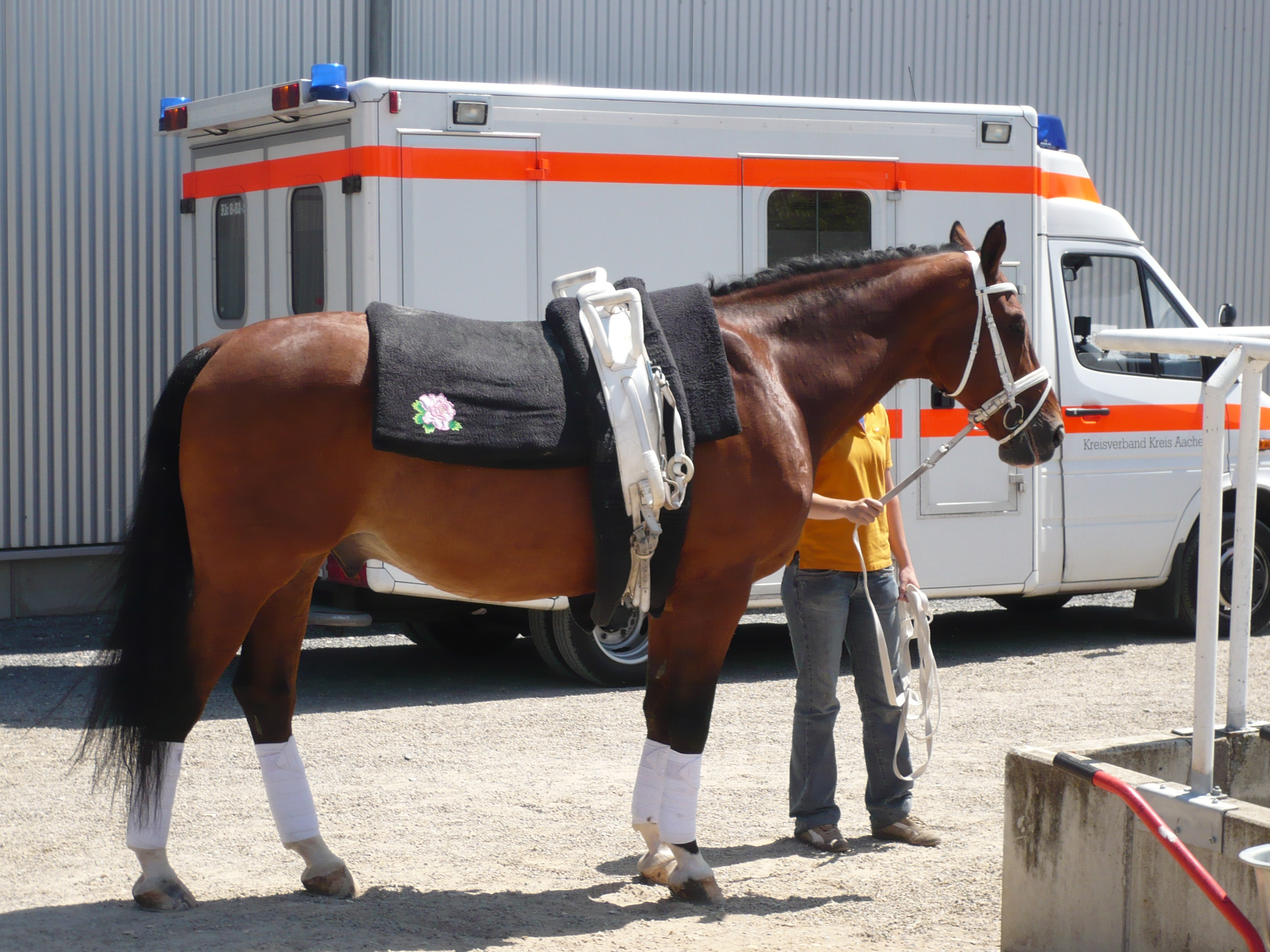 Voltigierpferd, ReitTurnier, 2008